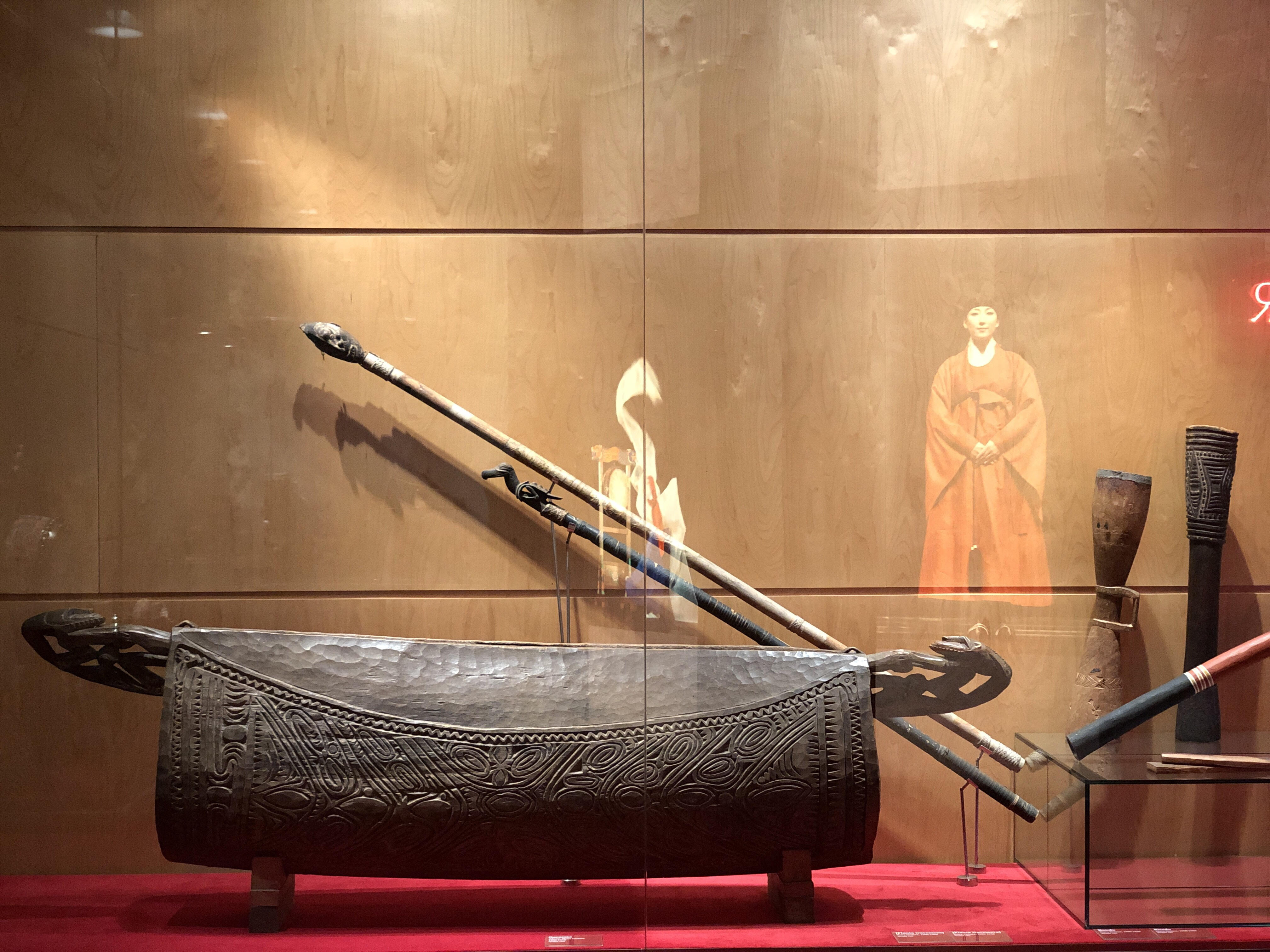 Garamut del fons del Museu de la Música de Barcelona, fet a Aibom a principis del segle XX